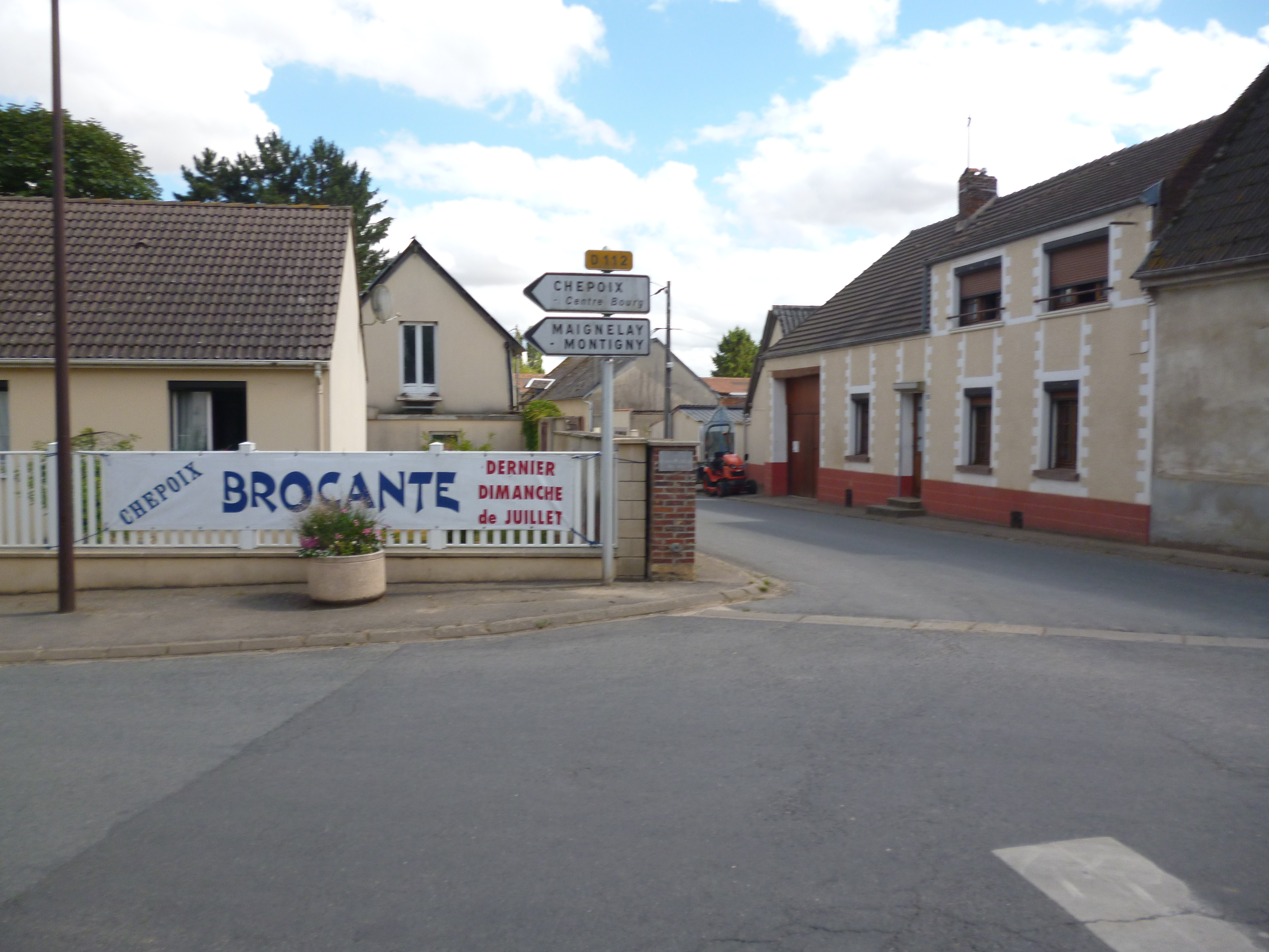 Repère de nivellement, situé sur la commune de Chepoix, à l'intersection de la rue Roland-Mariage (D112) et de la rue du Petit-Paris